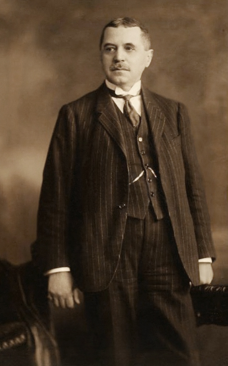 Schnetzer Ferenc későbbi honvédelmi miniszter 1917-ben